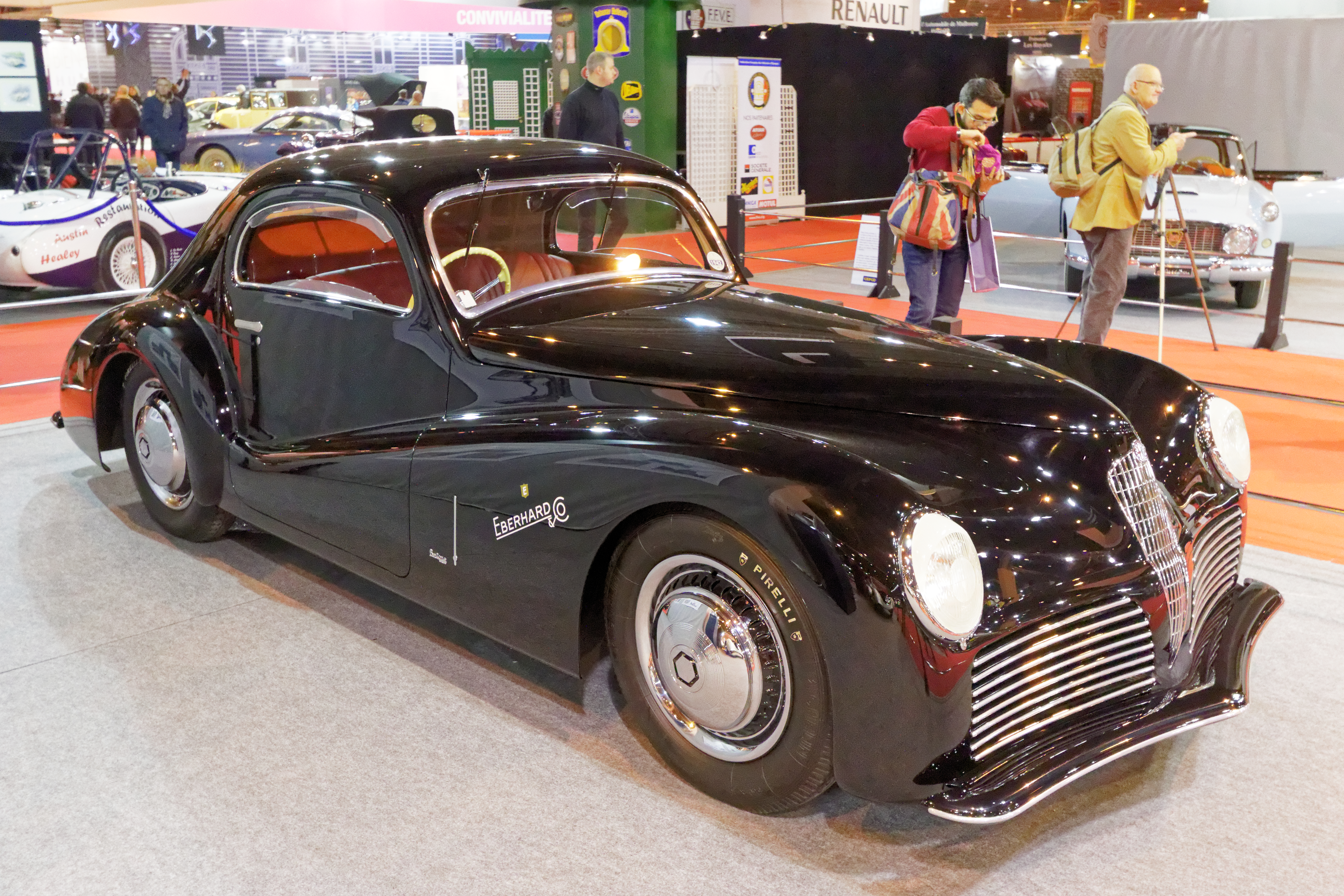 Une des voiture présentée lors du salon Rétromobile de Paris 2015